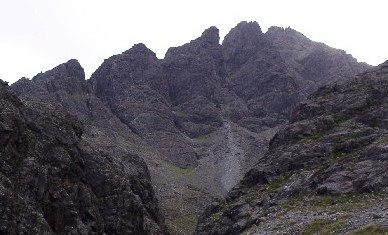 Basteir gorge